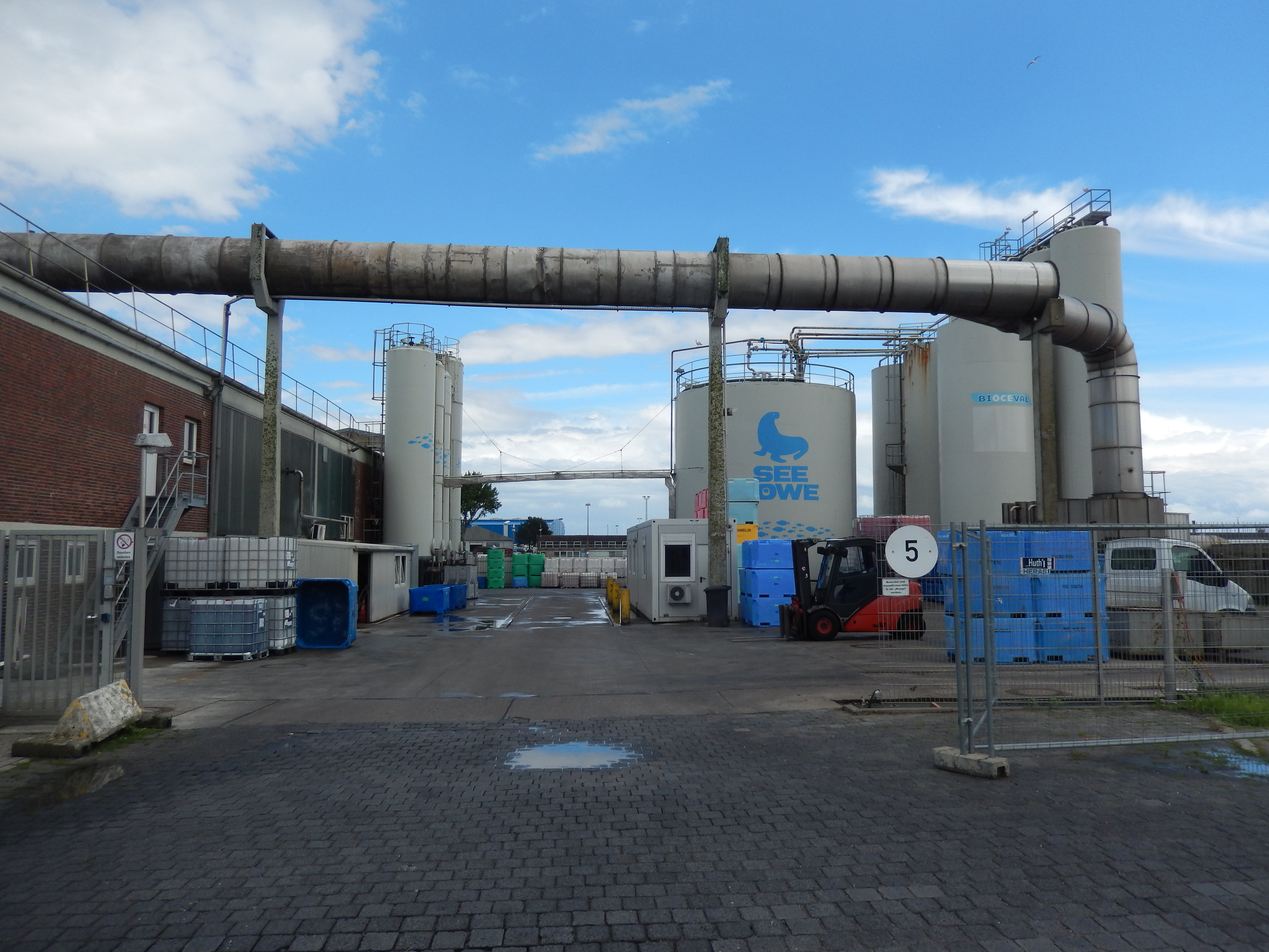 Seelöwe Bioceval Cuxhaven